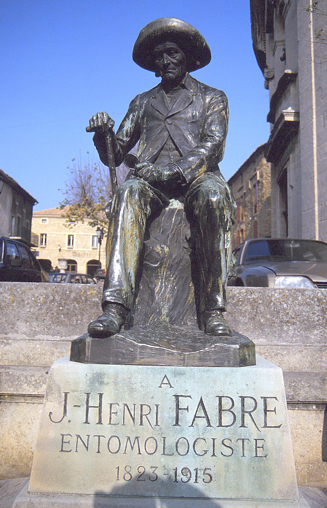 L'entomologiste Jean-Henri Fabre, au soir de sa vie, tient une canne dans sa main droite, et sa loupe à herboriser dans l'autre main, comme s'il observait quelque insecte, mais son chapeau de félibre et son expression songeuse confirment le poète taquinant la muse.